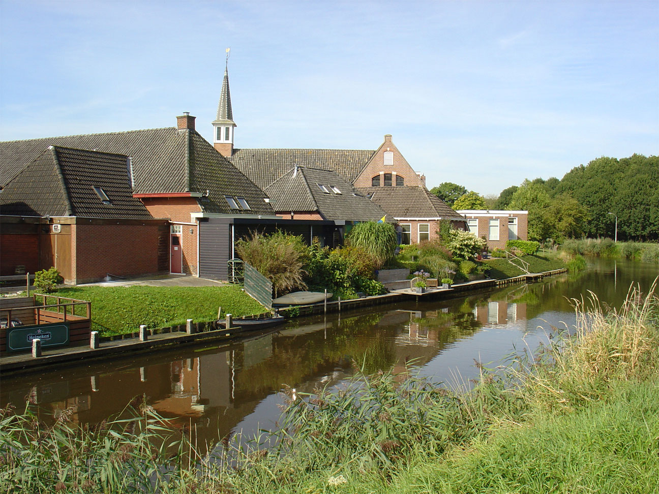 Garrelsweer in de gemeente Loppersum